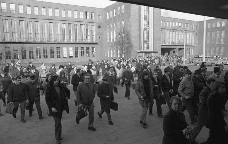 VW-Werk, Wolfsburg Arbeiter verlassen Werk